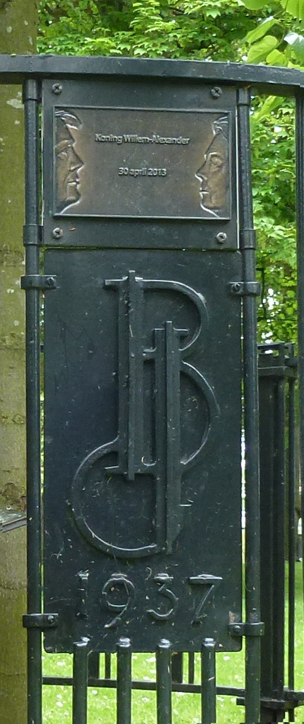 Lindeboom